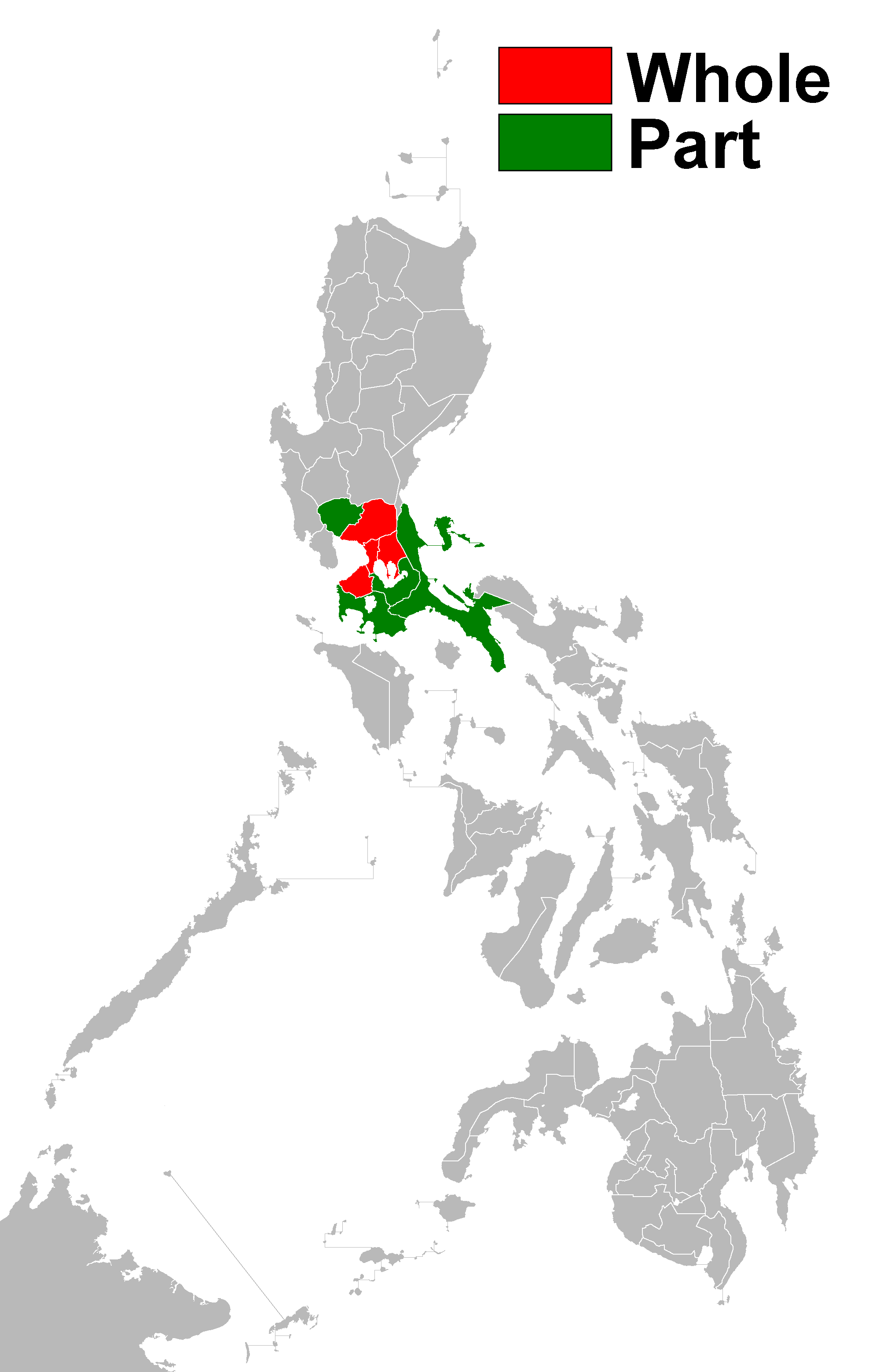 Meralco's franchise area.